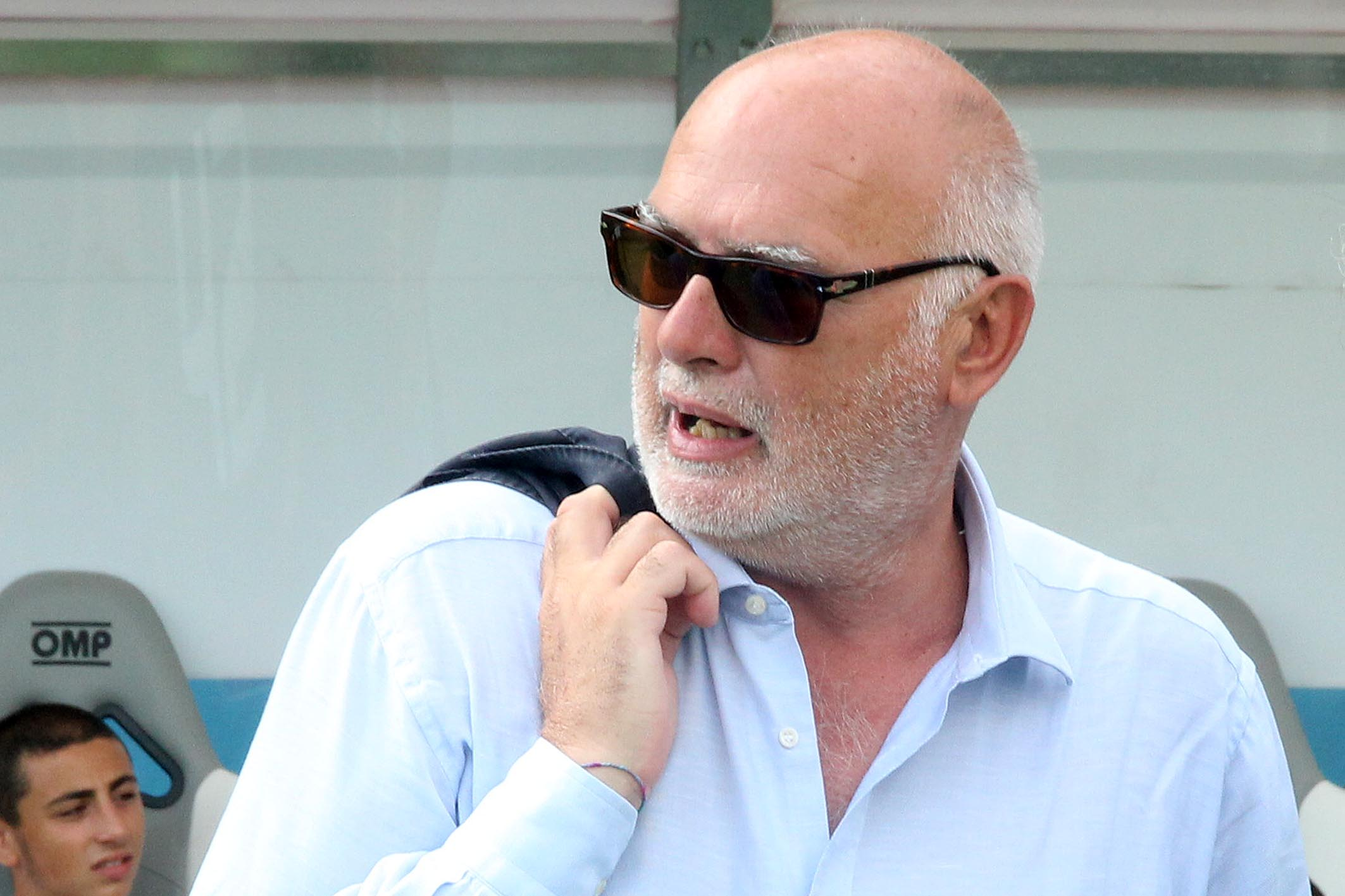 Antonio Gozzi è presidente della squadra di calcio di Serie B Virtus Entella